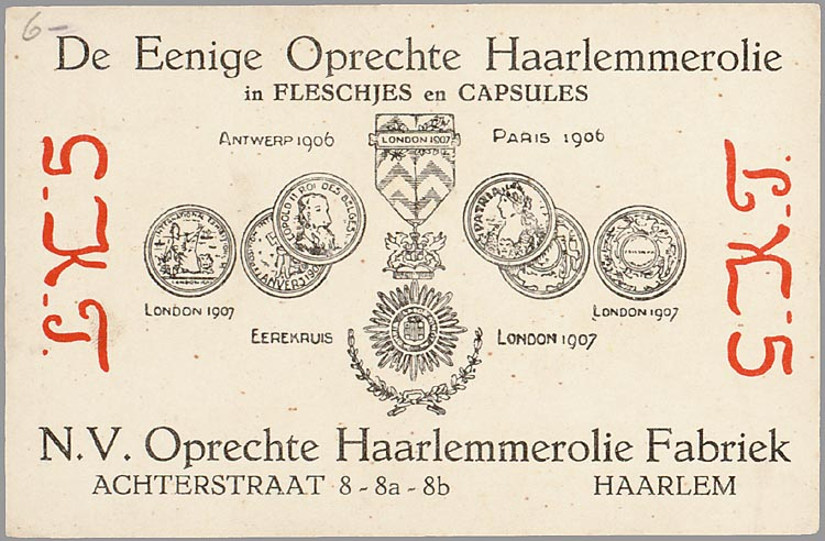 Reclamekaart: De eenige oprechte Haarlemmerolie.